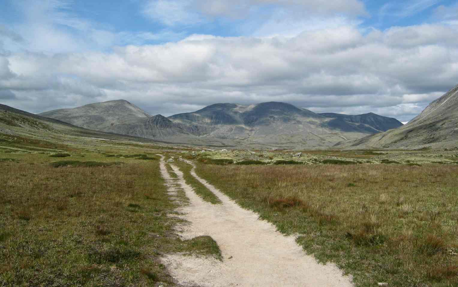 Rondane im Sommer selbst fotografiert und unterliegt der GNU-Lizenz.--Ot 09:26, 1. Mai 2004 (CEST)